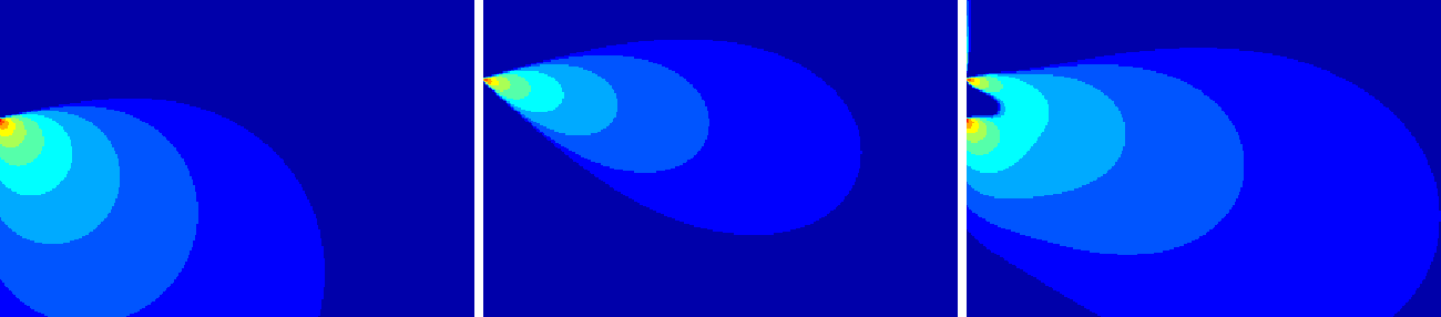 Deux enceintes de directivités différentes pour homogénéiser le niveau sonore: une enceinte ouvrant à 80° en bas piquée vers les premiers rangs et une autre ouvrant à 40° au dessus pointée vers le fond de l'audience.